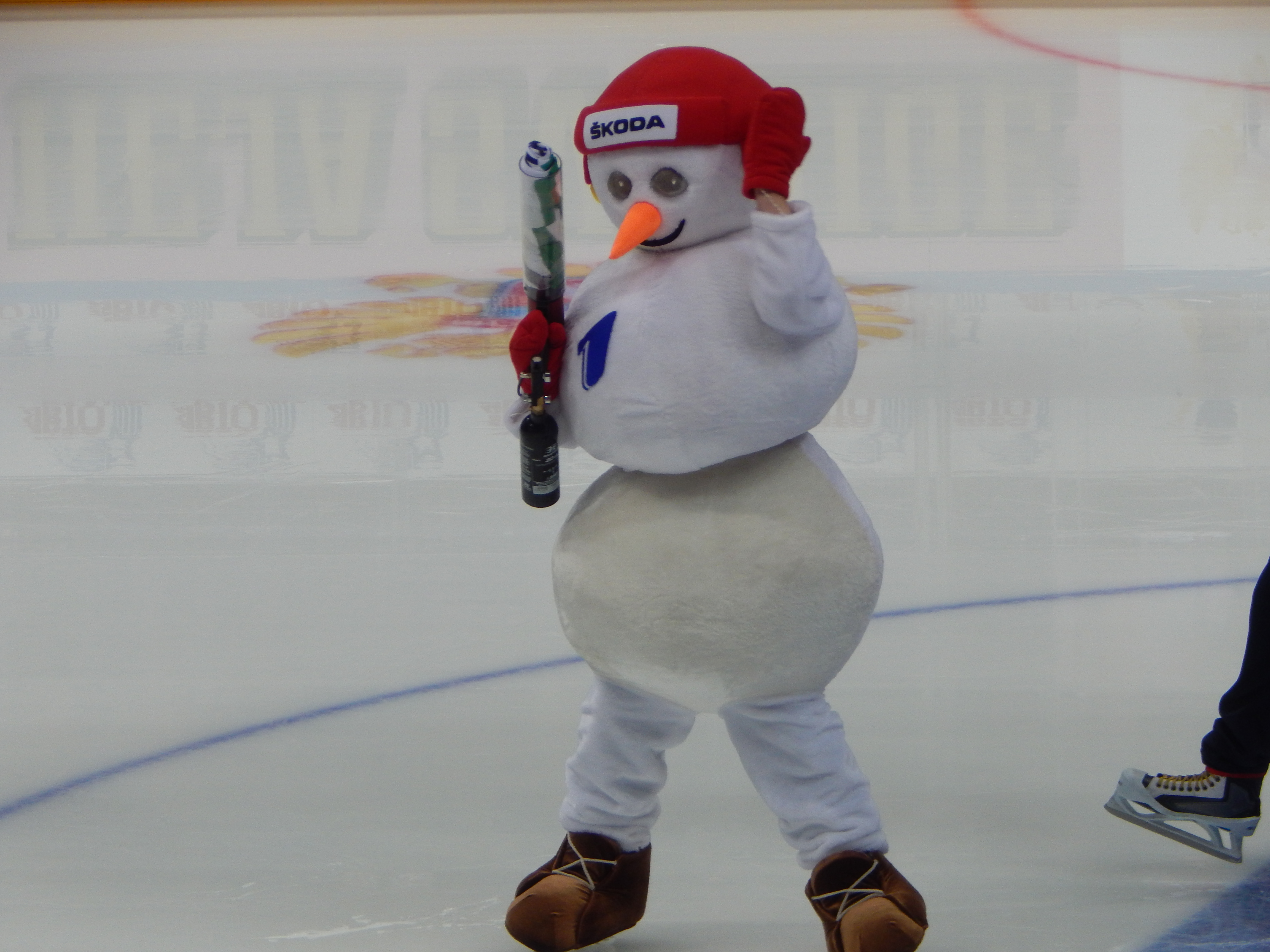 Снеговик - один из талисманов Кубка